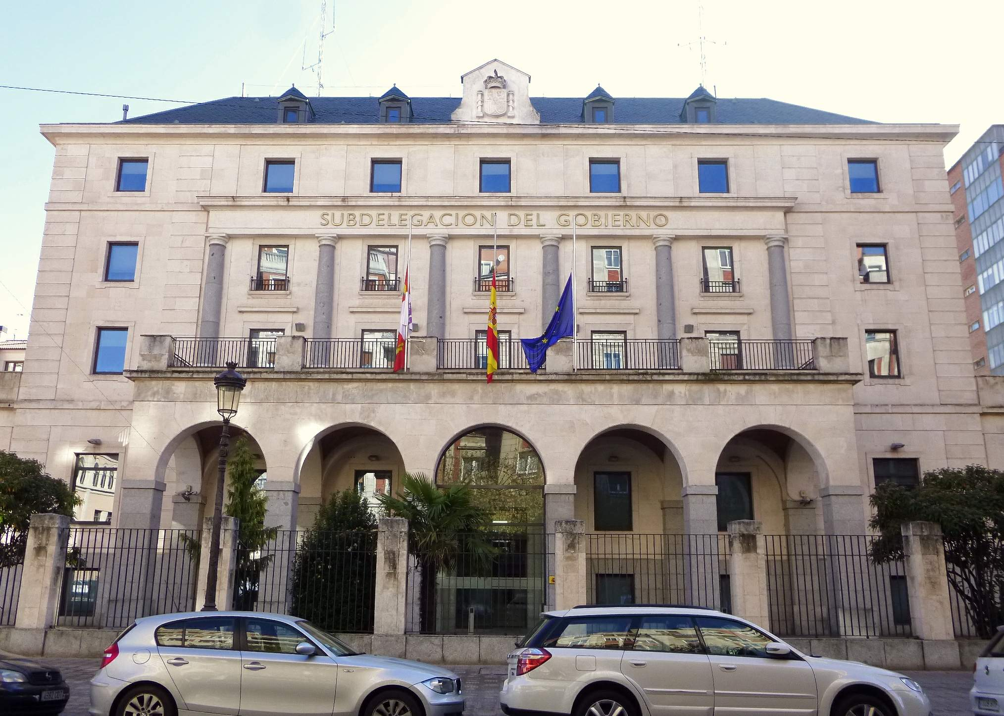 Burgos - Subdelegación del Gobierno (antigua oficina del Banco de España)